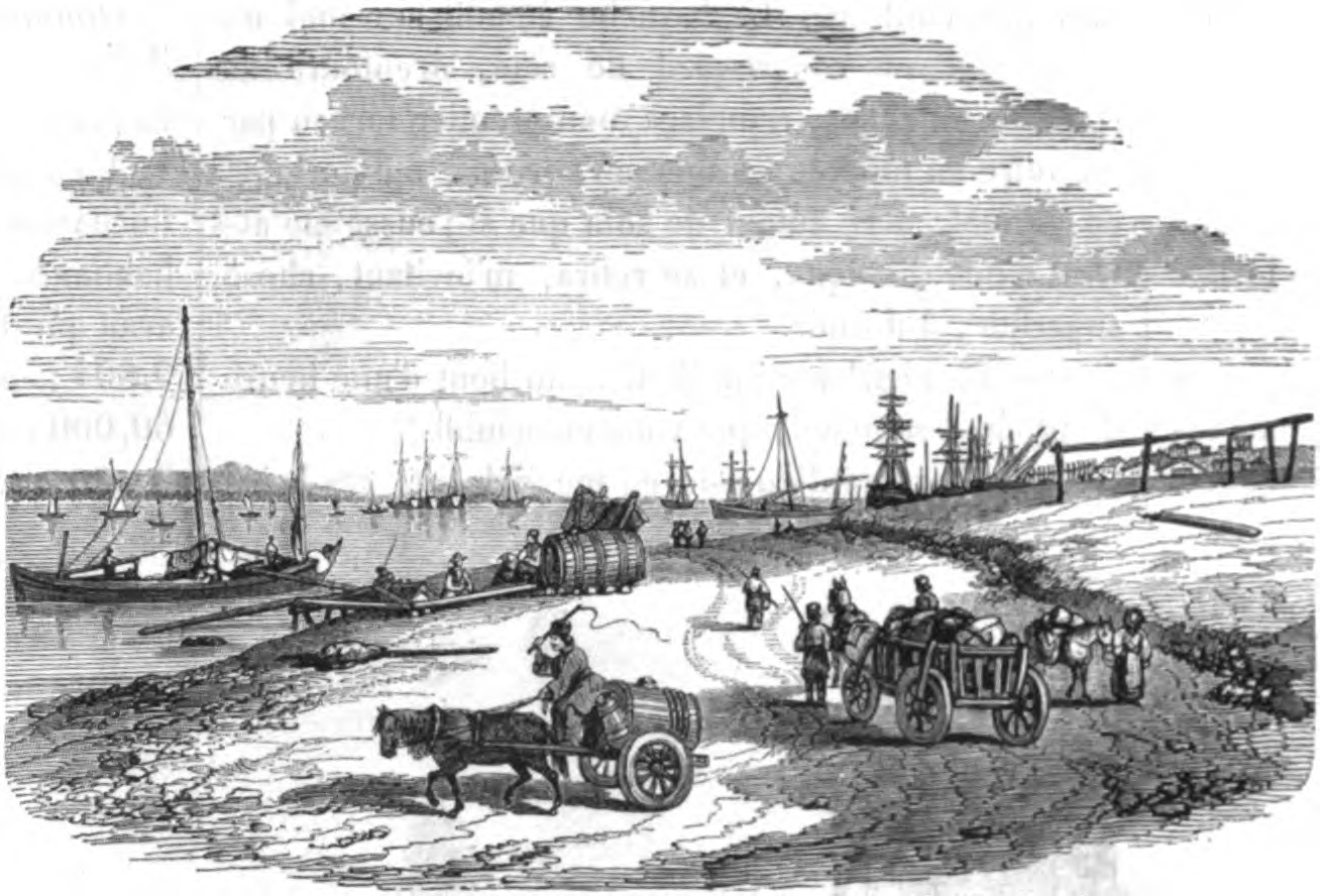 \Le port de Braila en Valachie